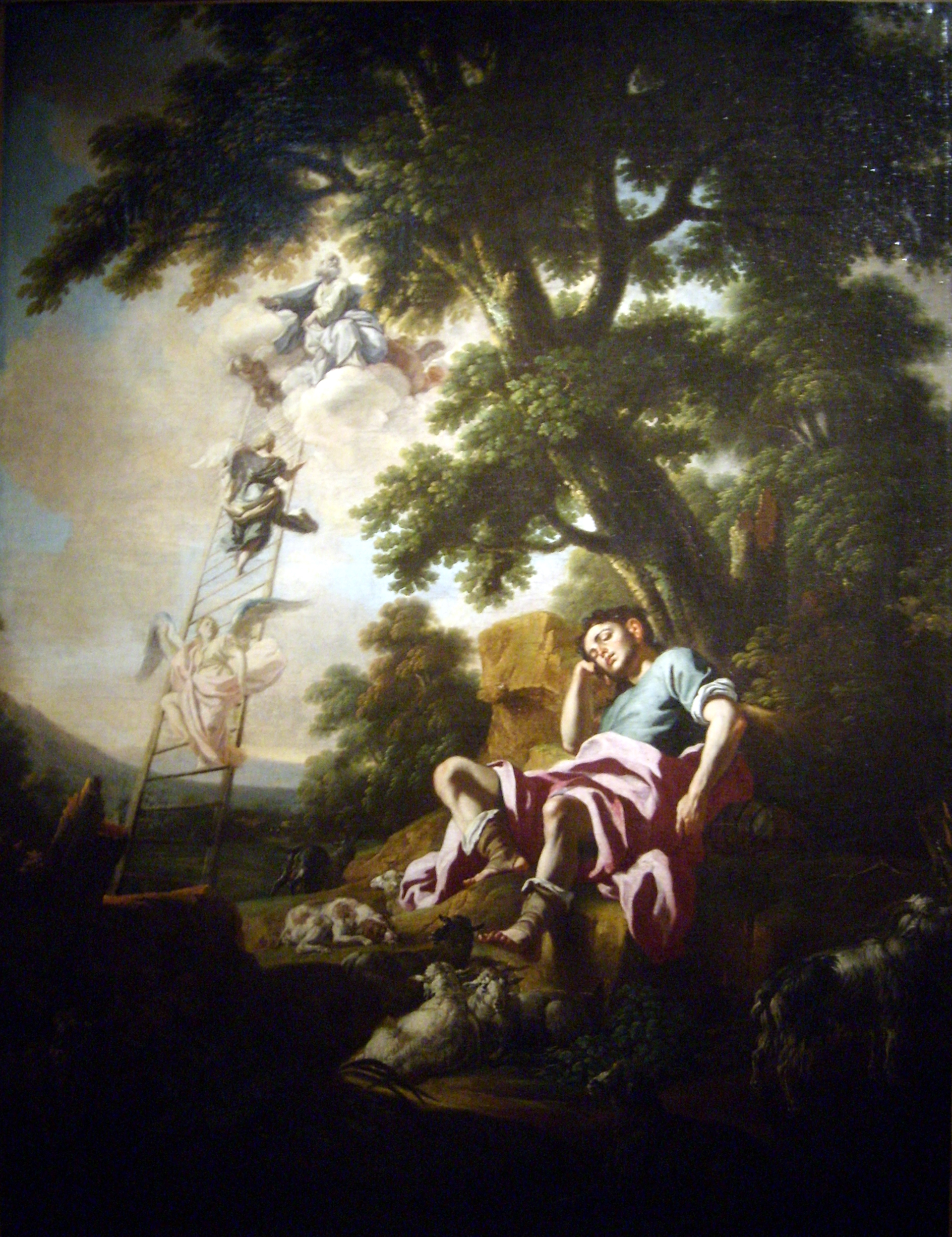 Le Songe de Jacob Jacob's ladder